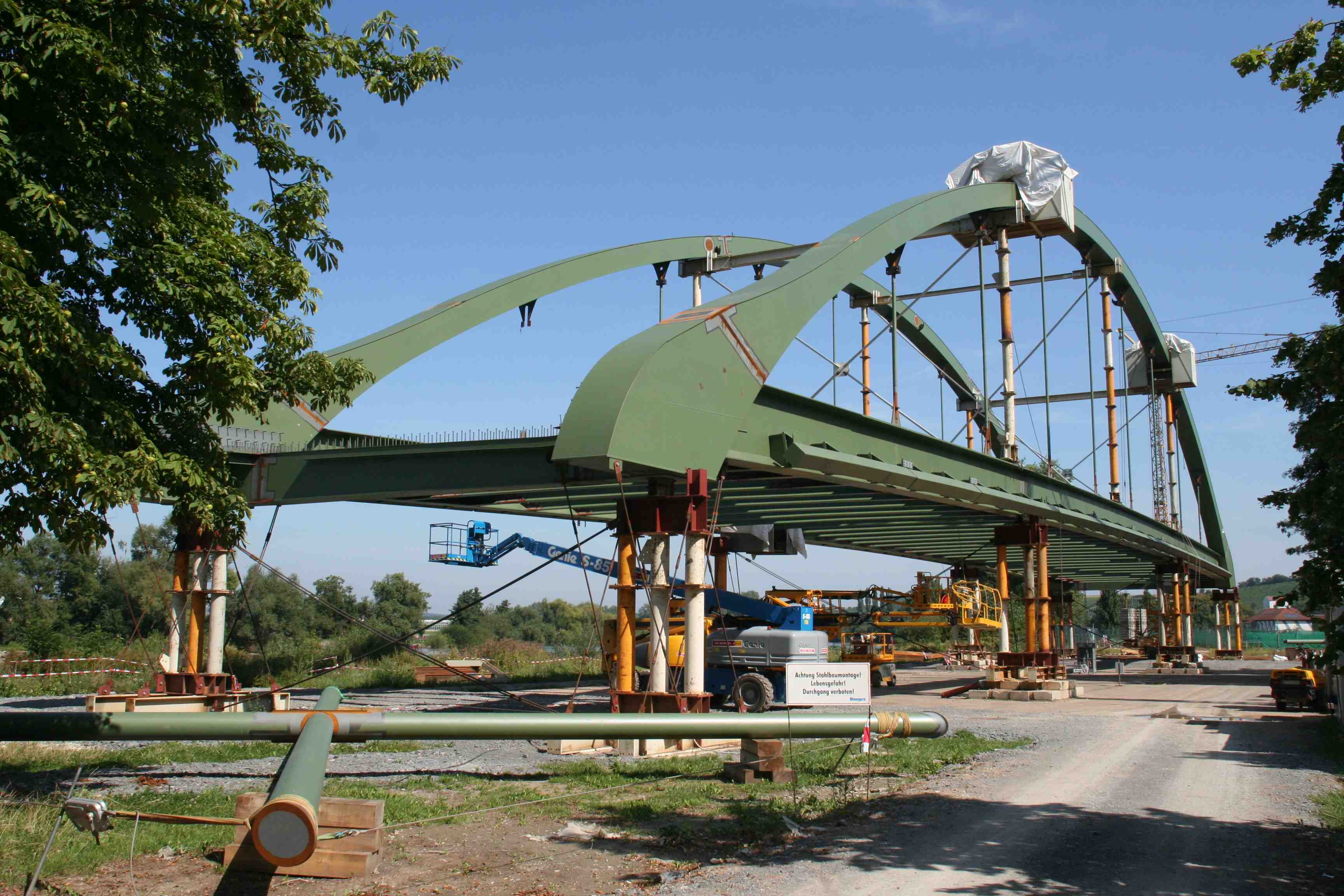 Mainbrücke Segnitz, Landkreis Kitzingen, Unterfranken